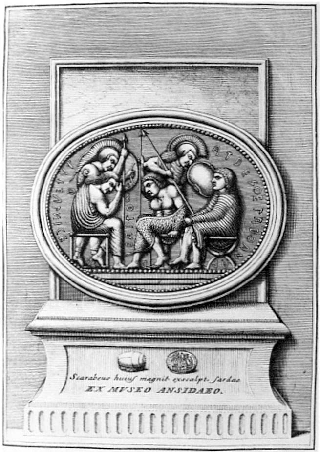 Scarabeo con i cinque eroi tebani (Stosch’scher Stein) Disegno dal Manoscritto A. 266 f. 6 Biblioteca Marucelliana di Firenze